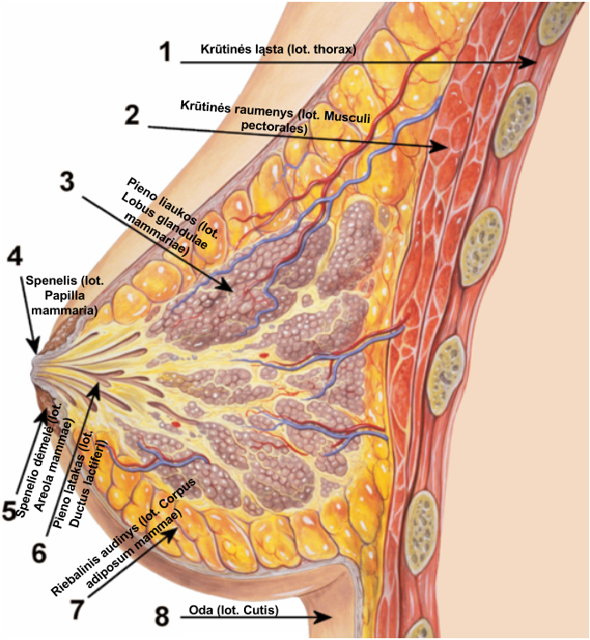 Krūties sandara lietuviškai ir lotyniškai